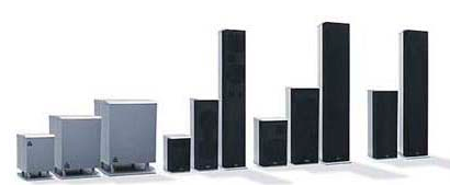 De volledige BNS Intelligent lijn.